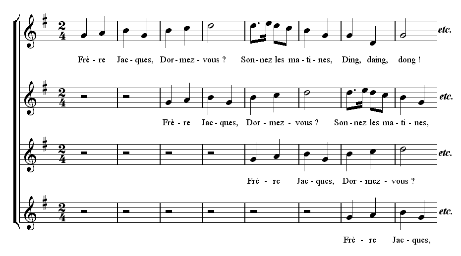 Description :Canon_Frere_Jacques Source : Personnelle Licence : GFDL